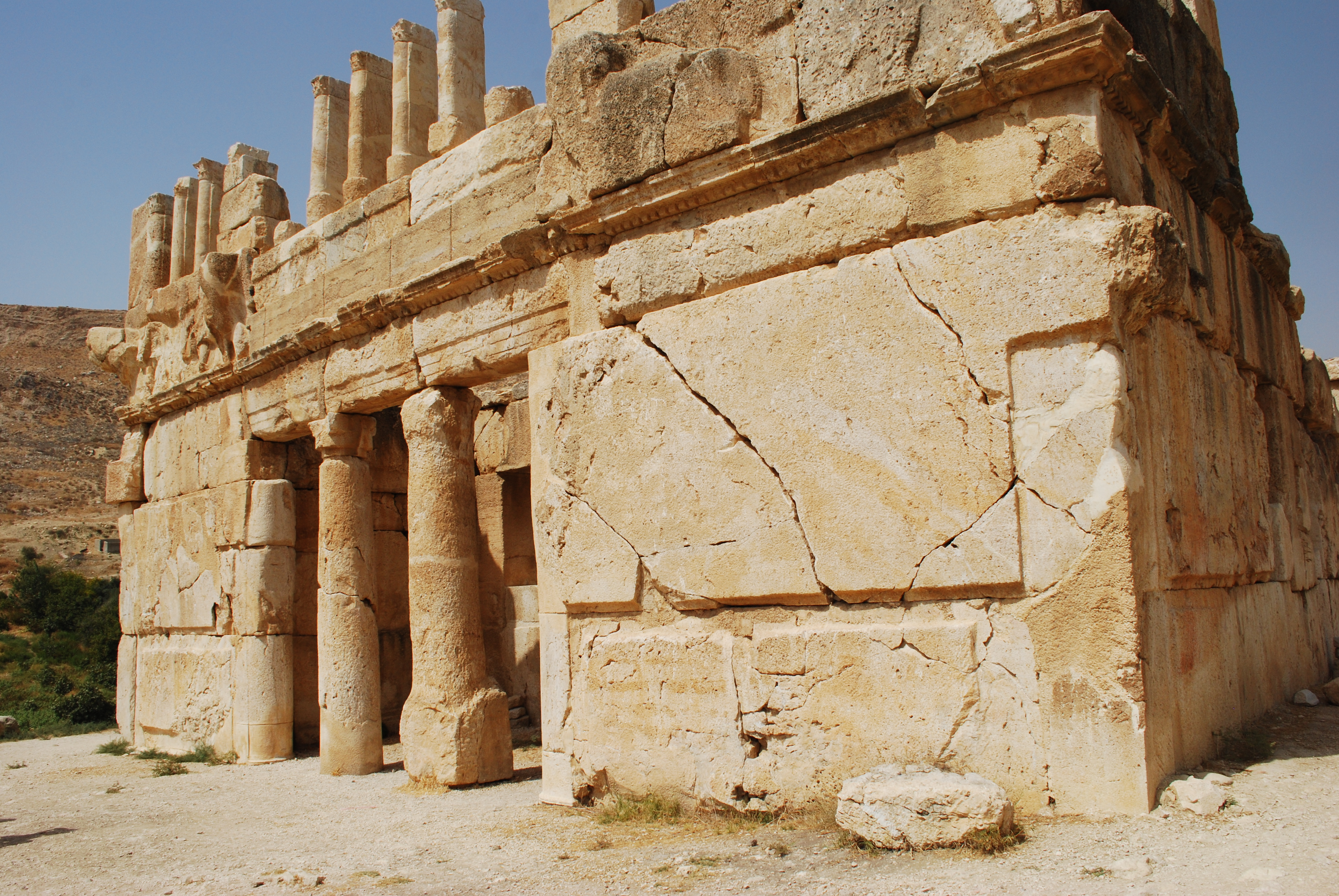 Le château d'Iraq al Amir : façade sud.